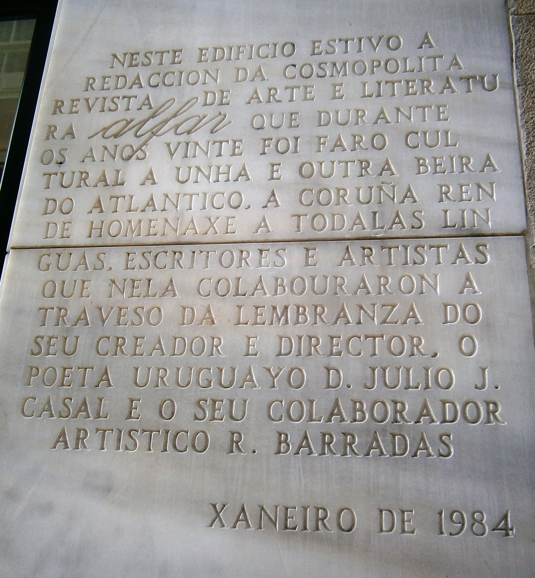 Placa en lembranza da fundación da Revista Alfar na rúa Real da Coruña